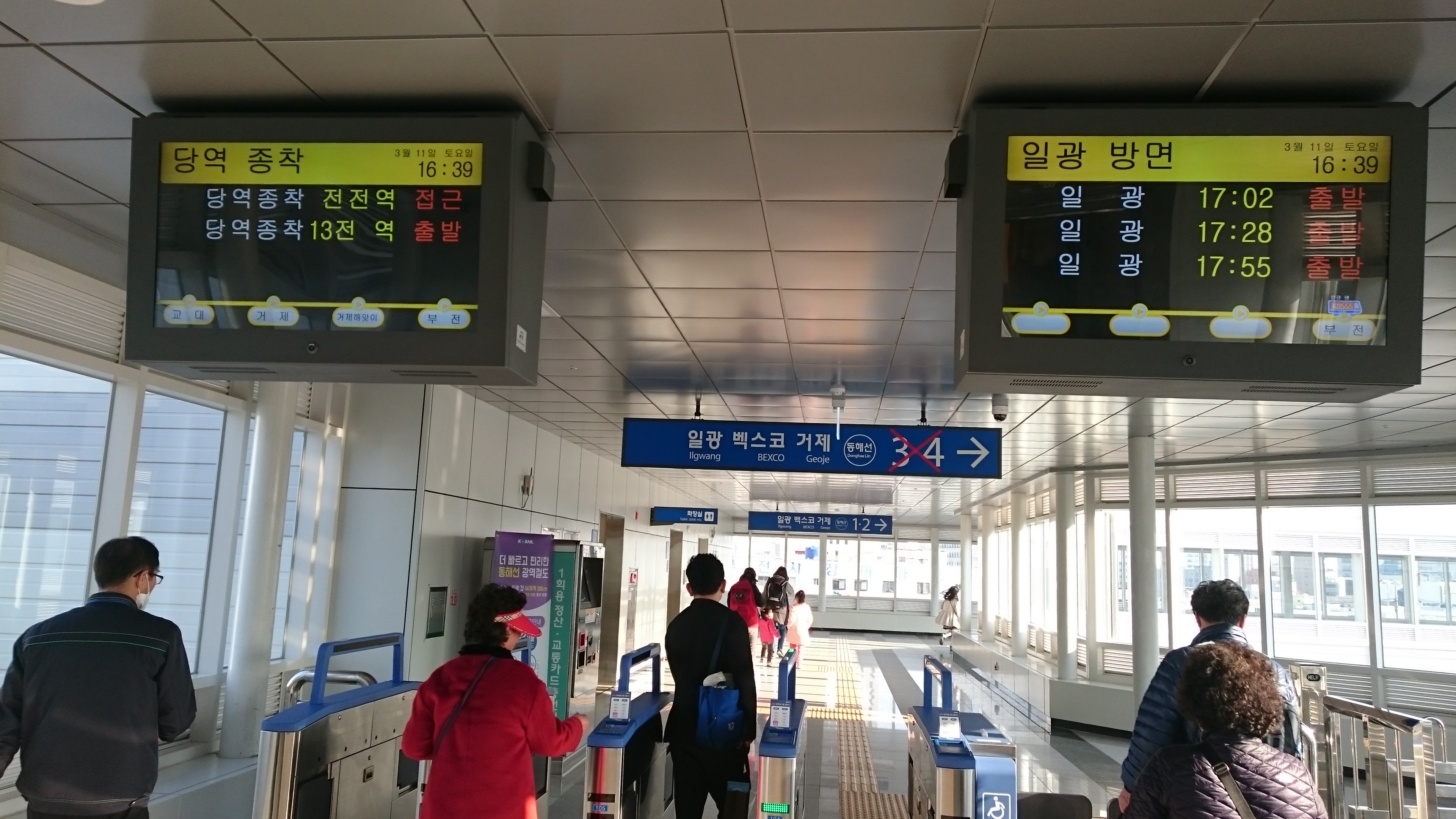 釜田駅東海電鉄線改札口(列車線には改札口が無い)。